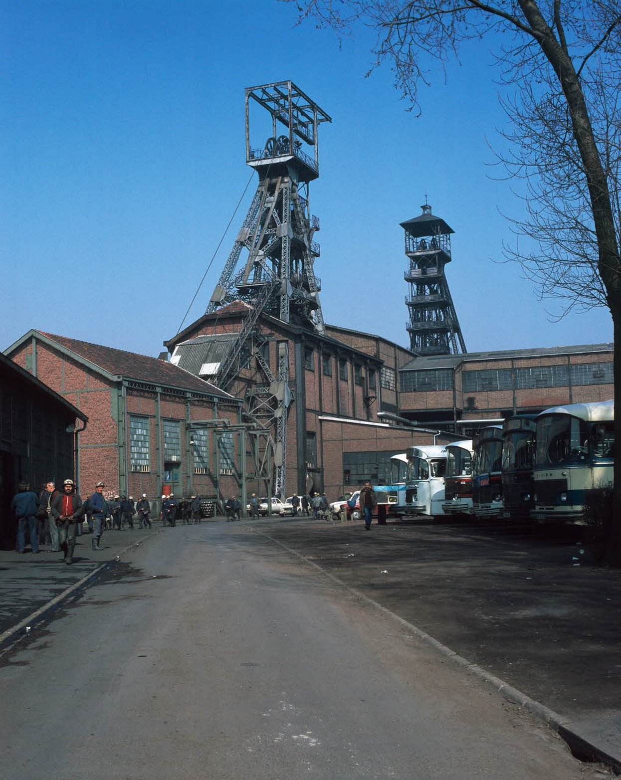 La Fosse n° 24 - 25 de la Compagnie des mines de Courrières était un charbonnage constitué de deux puits situé à Estevelles, Pas-de-Calais, Nord-Pas-de-Calais, France.